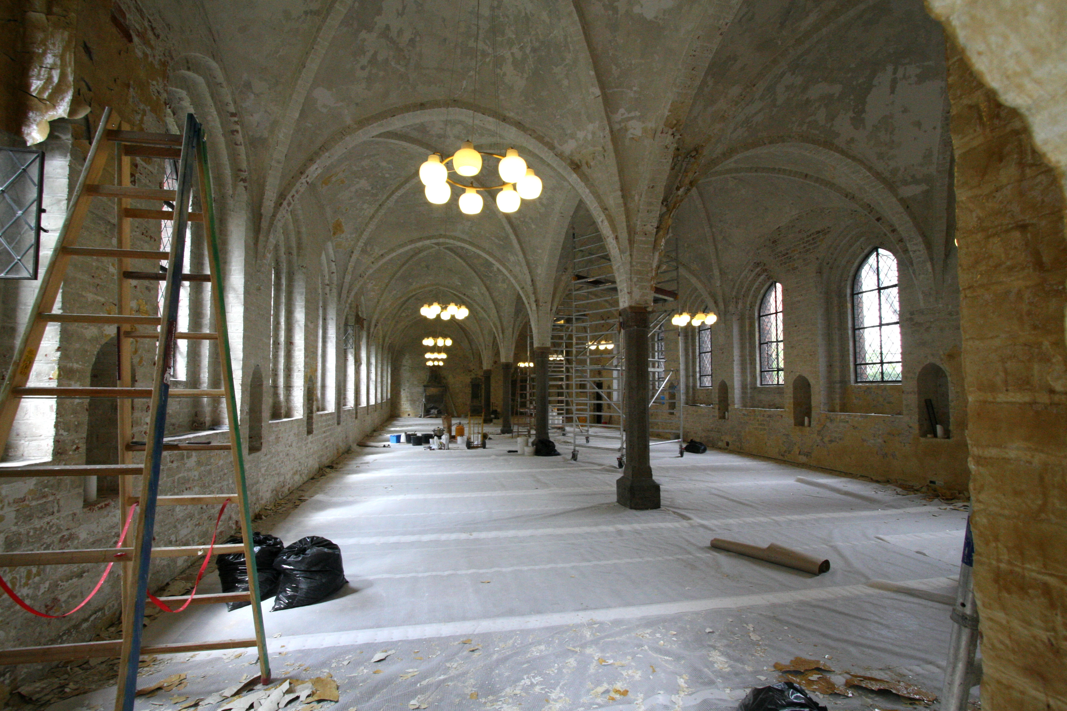 Helligåndskirken, Copenhagen, Denmark. Helligaandshuset, exhibition hall during renovation in 2008.